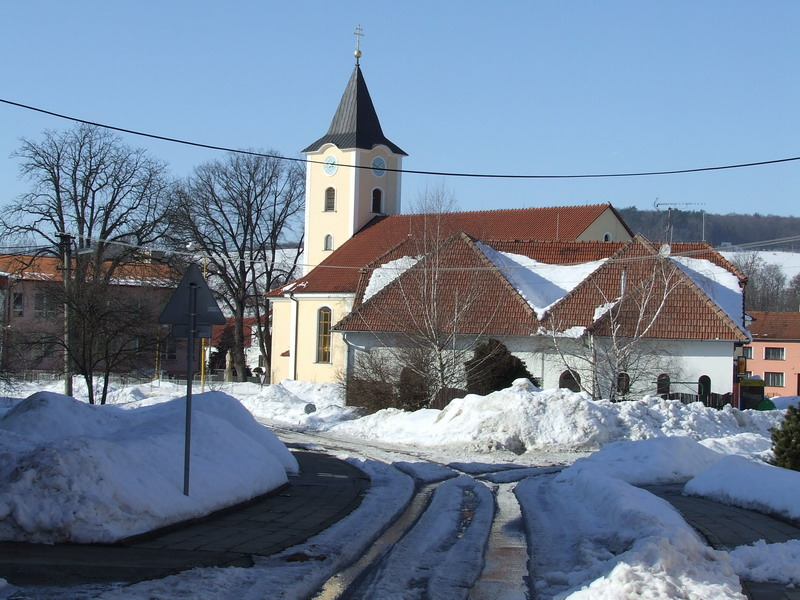 Kostel nanebevzetí Panny Marie v Šumicích, okres Uherské Hradiště